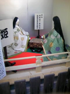 北野天満宮内の西陣織で作られたお姫さま